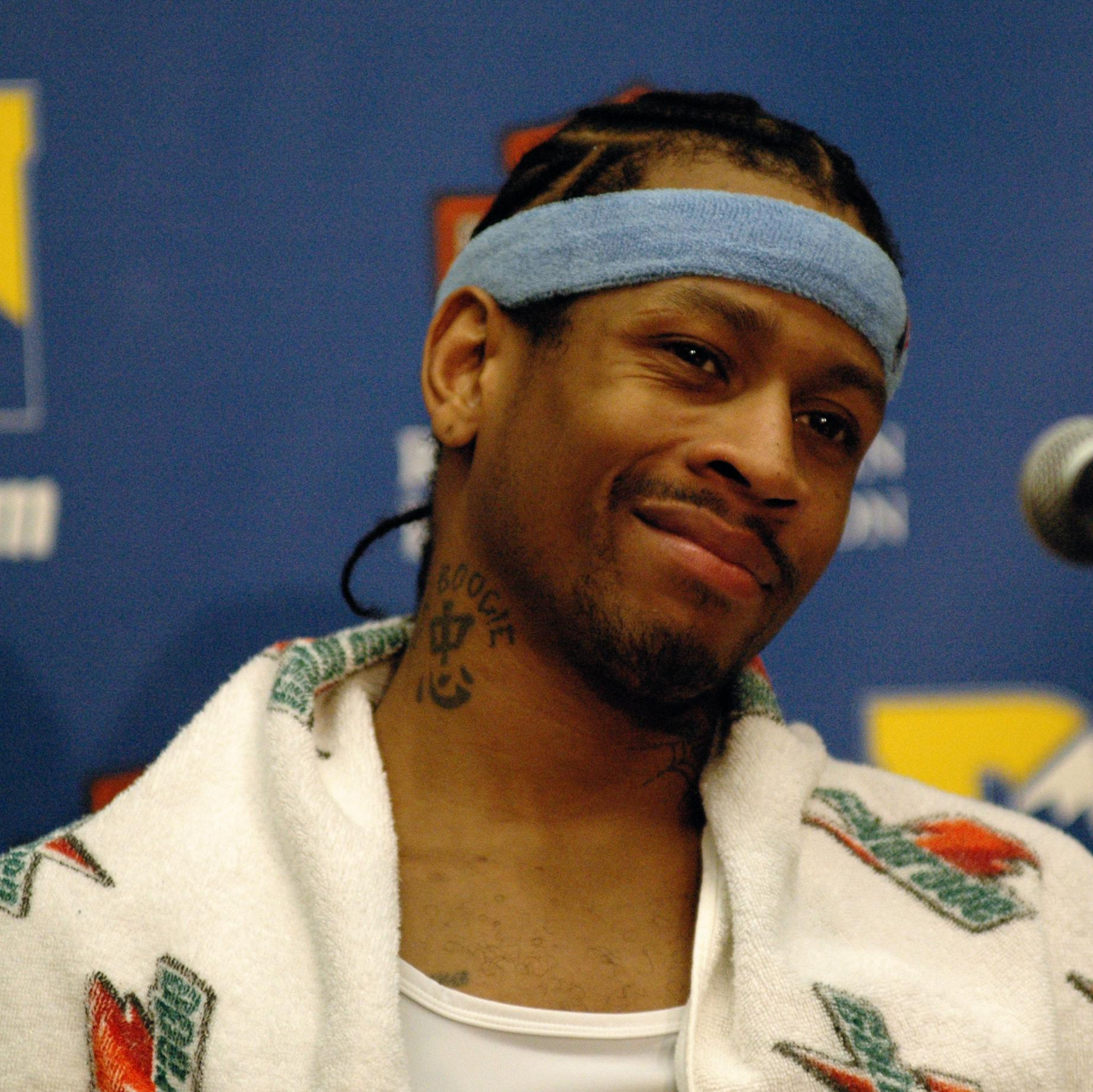 Allen Iverson, Denver Nuggets, post-game interview.